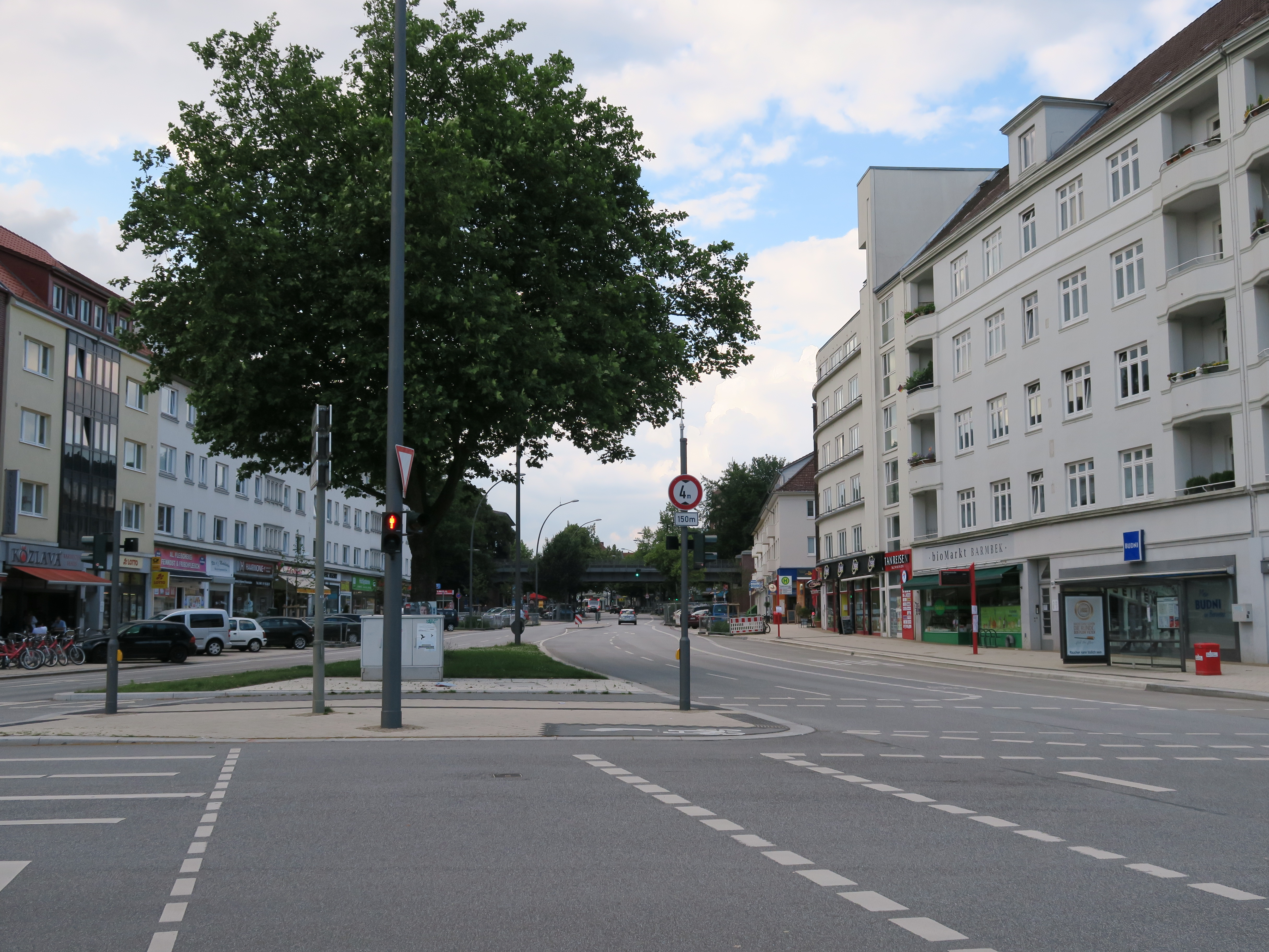 Fuhlsbüttler Straße, Ecke Hellbrookstraße, Blickrichtung stadtauswärts